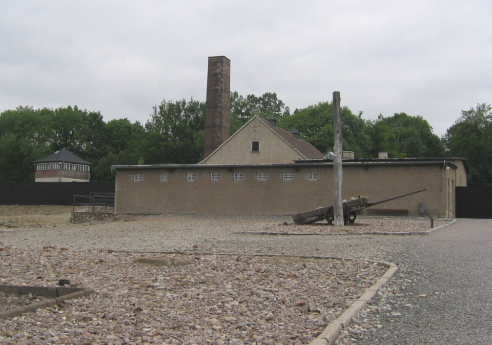 Ehemaliges Krematorium des KZ Buchenwald (heute: Gedenkstätte Buchenwald)